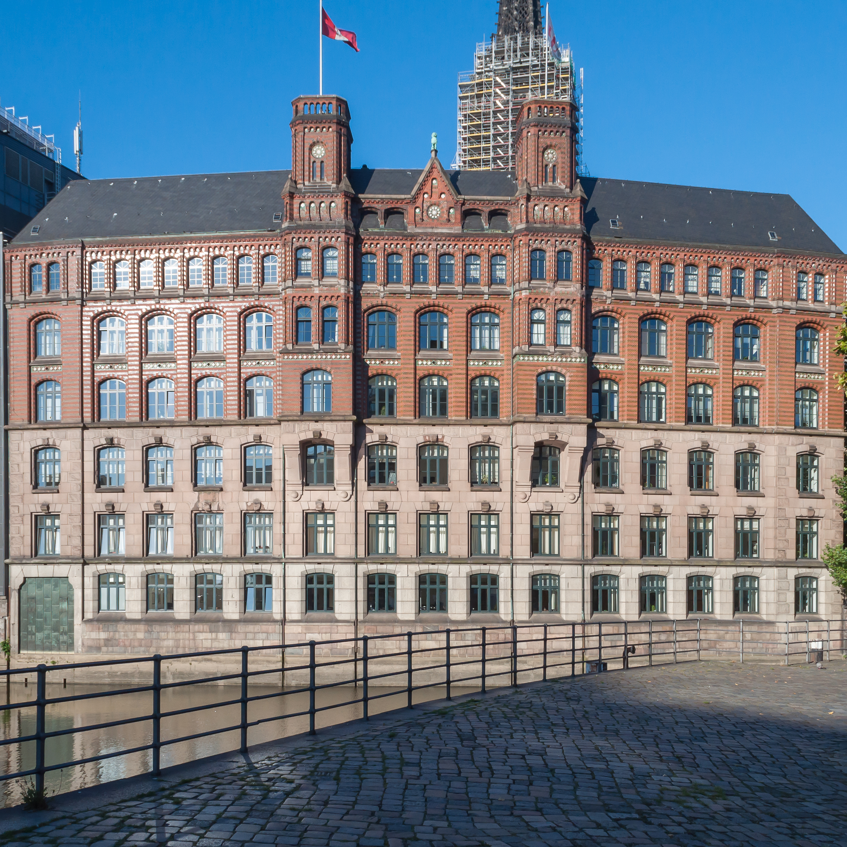 Kontorhaus Laeiszhof in Hamburg-Altstadt. This is a photograph of an architectural monument.